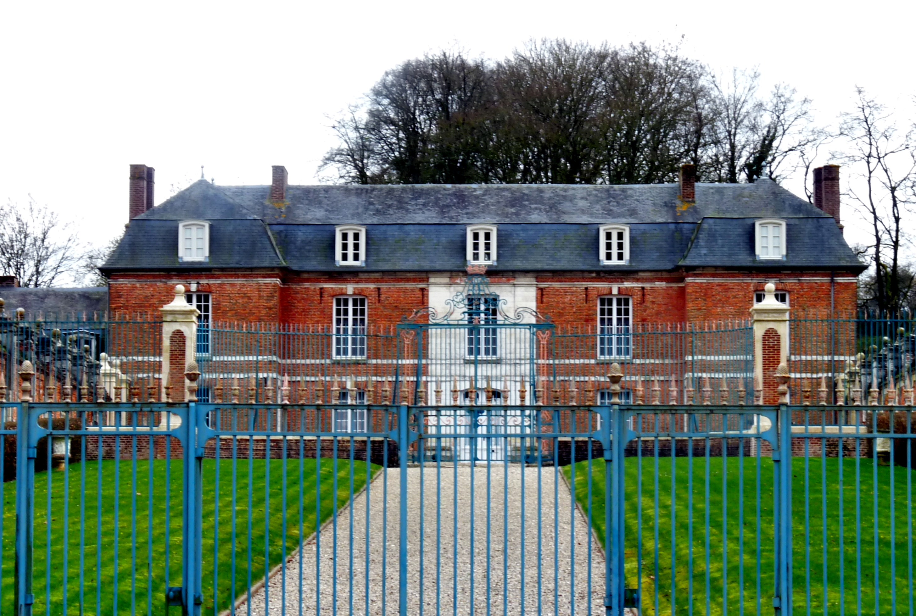 Château de Romesnil .